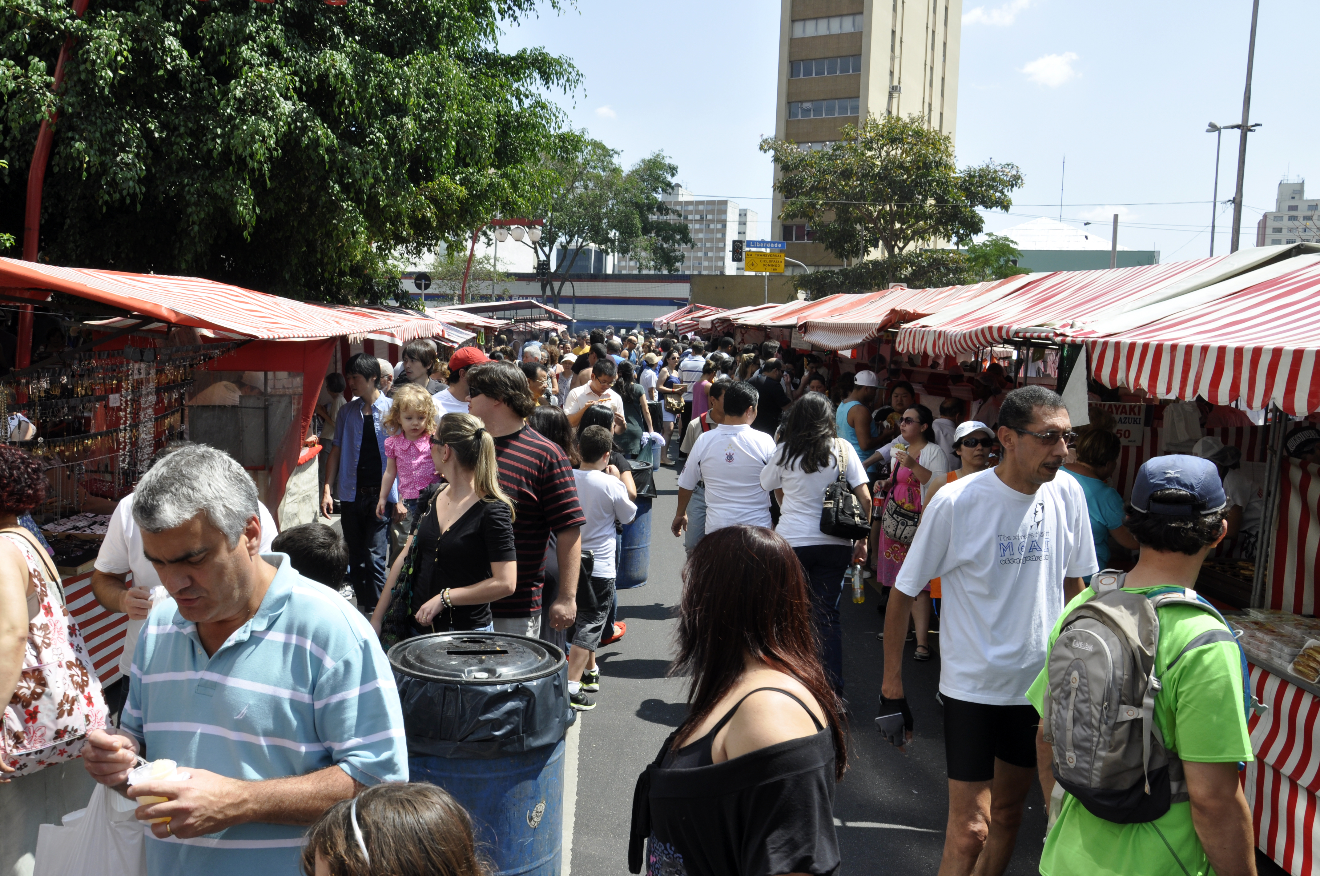 Foto da feira da Liberdade, em São Paulo, com diversas barracas de comida e objetos variados